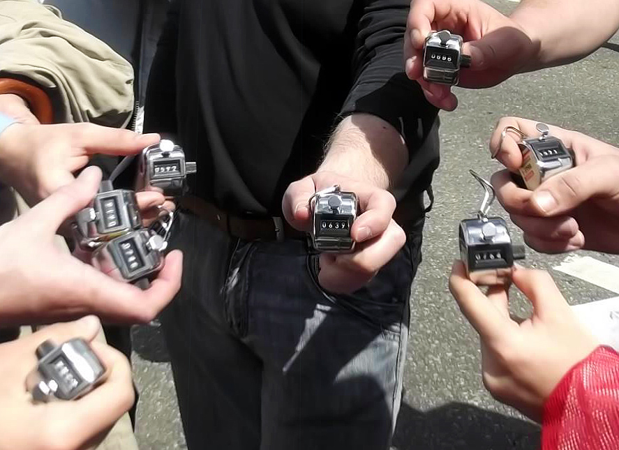 Механические приборы для проведения ручного подсчёта